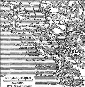 Situationsplan von Pola